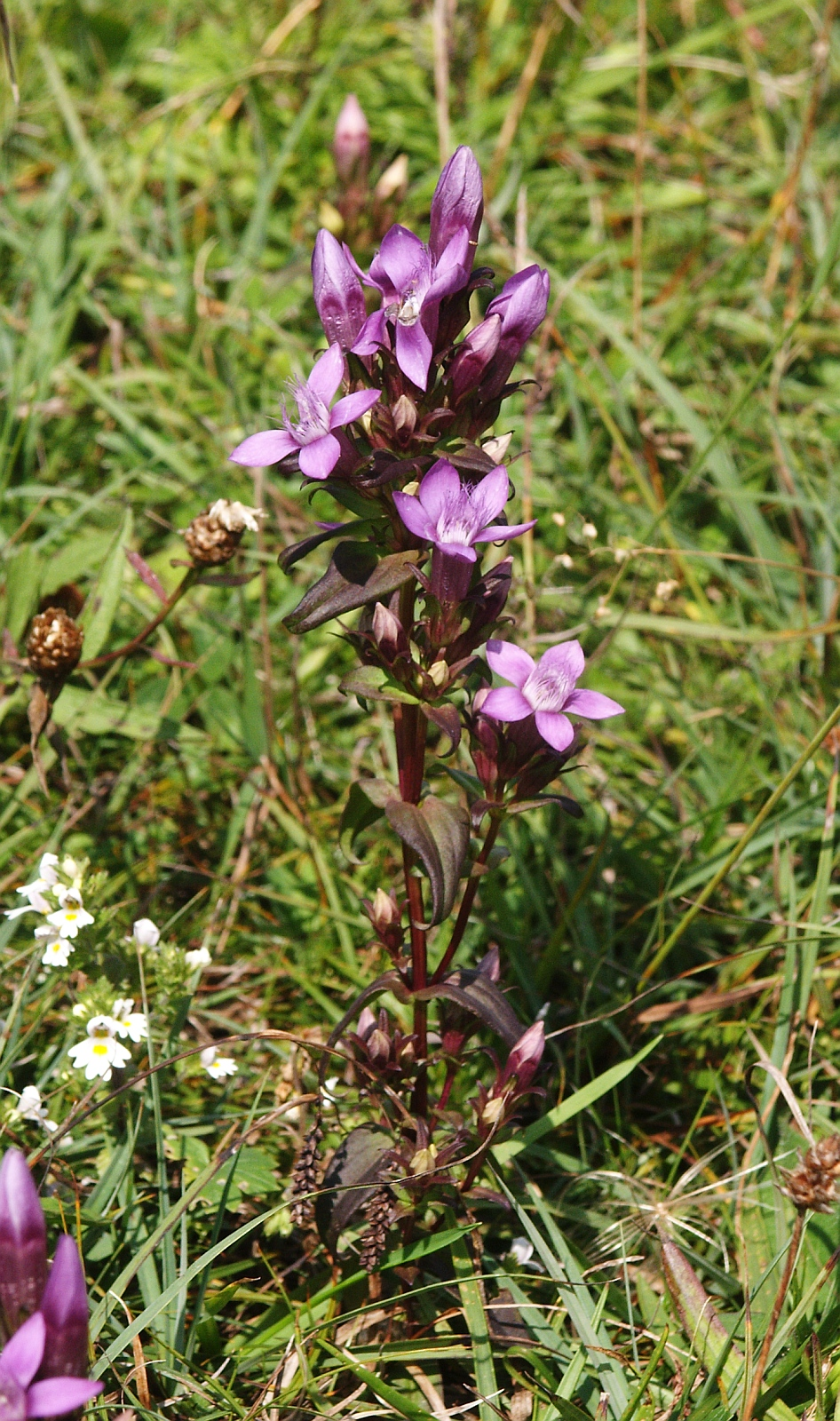 Gentianella germanica, Tannheimer Tal, Austria